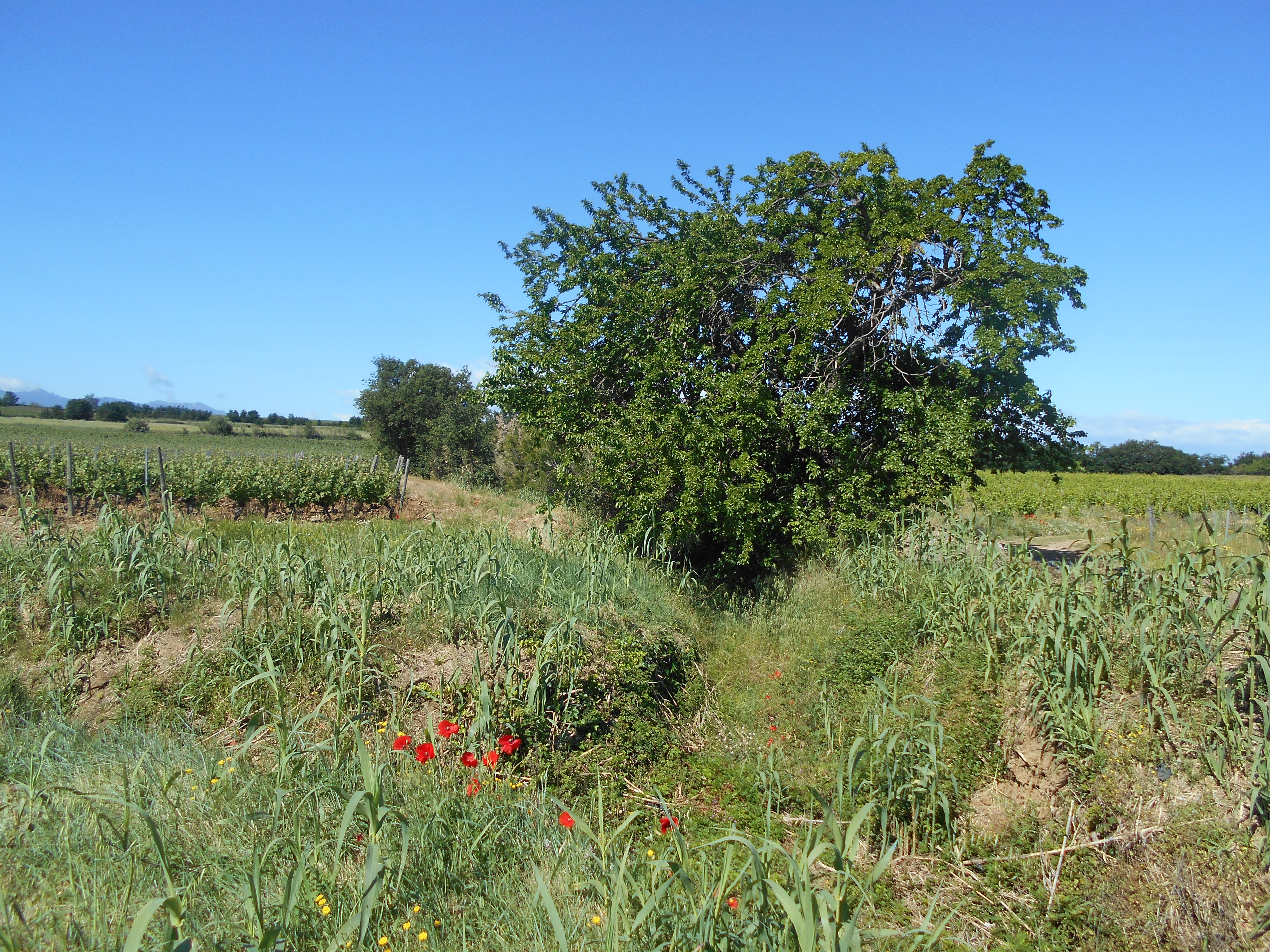 Unknown language: El Còrrec de la Pagesa